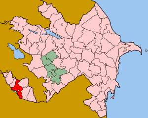 Map of Azerbaijan showing Babek (Babək) rayon.